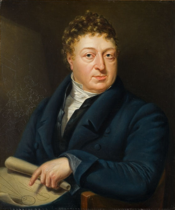 Zelfportret van Pieter III Barbiers.